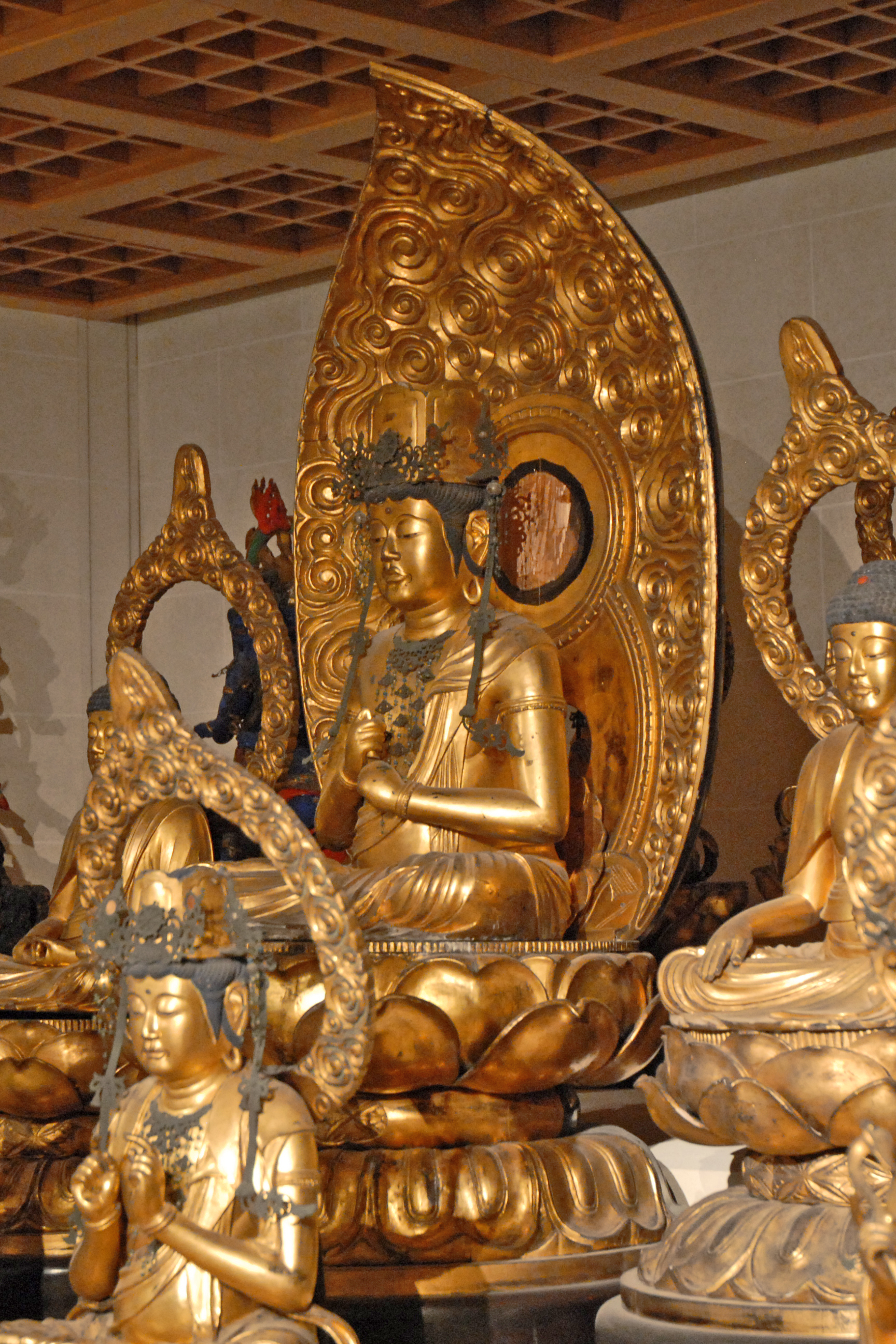 Grand mandala du temple impérial Tôji de Kyoto (détail) Bois laqué doré et bois polychrome Groupe central : Les cinq Buddha et les quatre grands Bodhisattva Au centre : "le Grand irradiant" Bouddhisme ésotérique Site du musée Guimet visite virtuelle du Panthéon Bouddhique